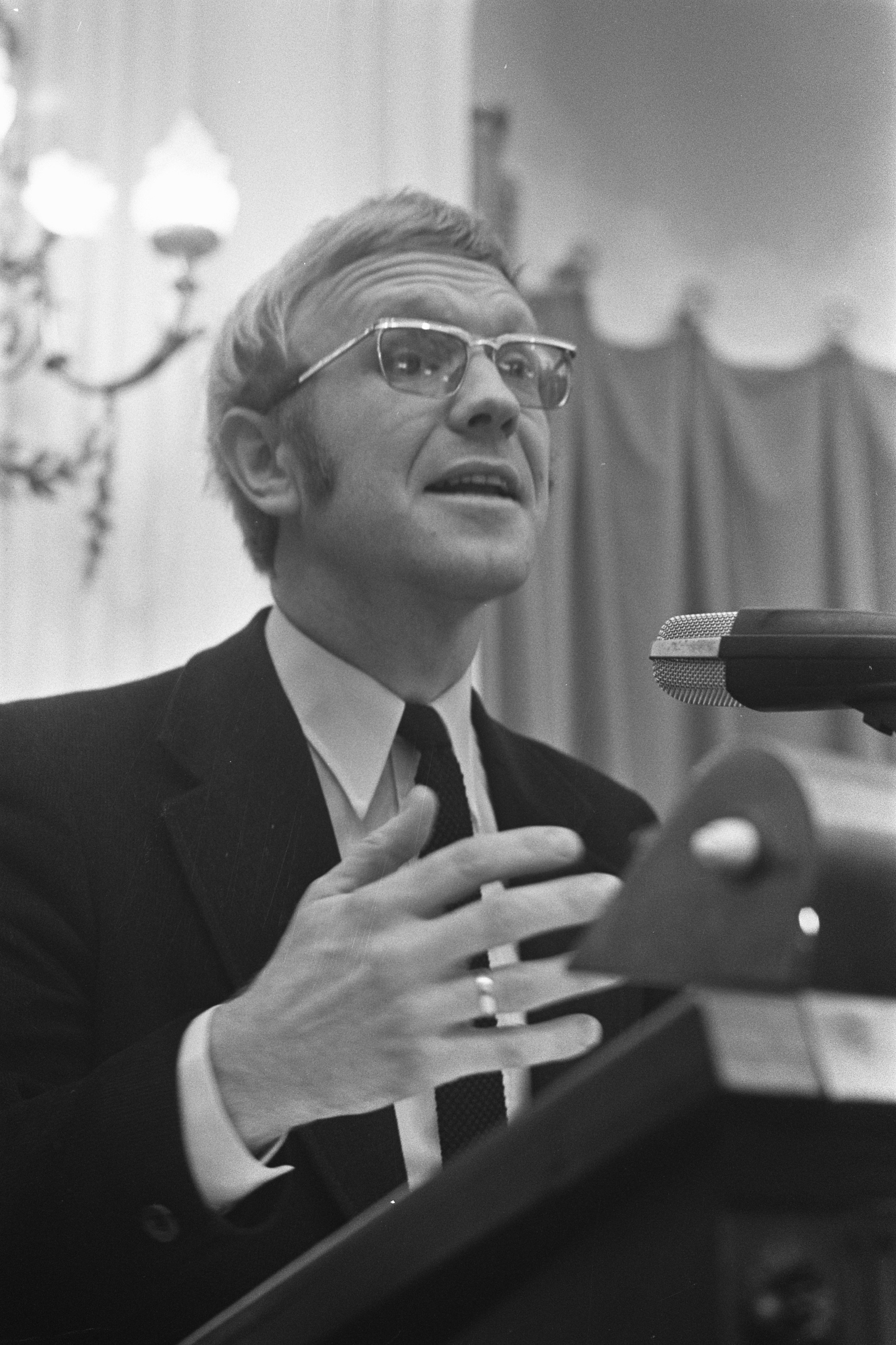 Collectie / Archief : Fotocollectie Anefo Reportage / Serie : [ onbekend ] Beschrijving : Tweede Kamer debat over schoolgeldverhoging en begroting van Defensie, Stemerdink (PvdA) Datum : 18 oktober 1972 Locatie : Den Haag, Zuid-Holland Trefwoorden : overheidsbegrotingen, parlementaire debatten, politiek Persoonsnaam : Stemerdink, Bram Fotograaf : Verhoeff, Bert / Anefo Auteursrechthebbende : Nationaal Archief Materiaalsoort : Negatief (zwart/wit) Nummer archiefinventaris : bekijk toegang 2.24.01.05 Bestanddeelnummer : 925-9608